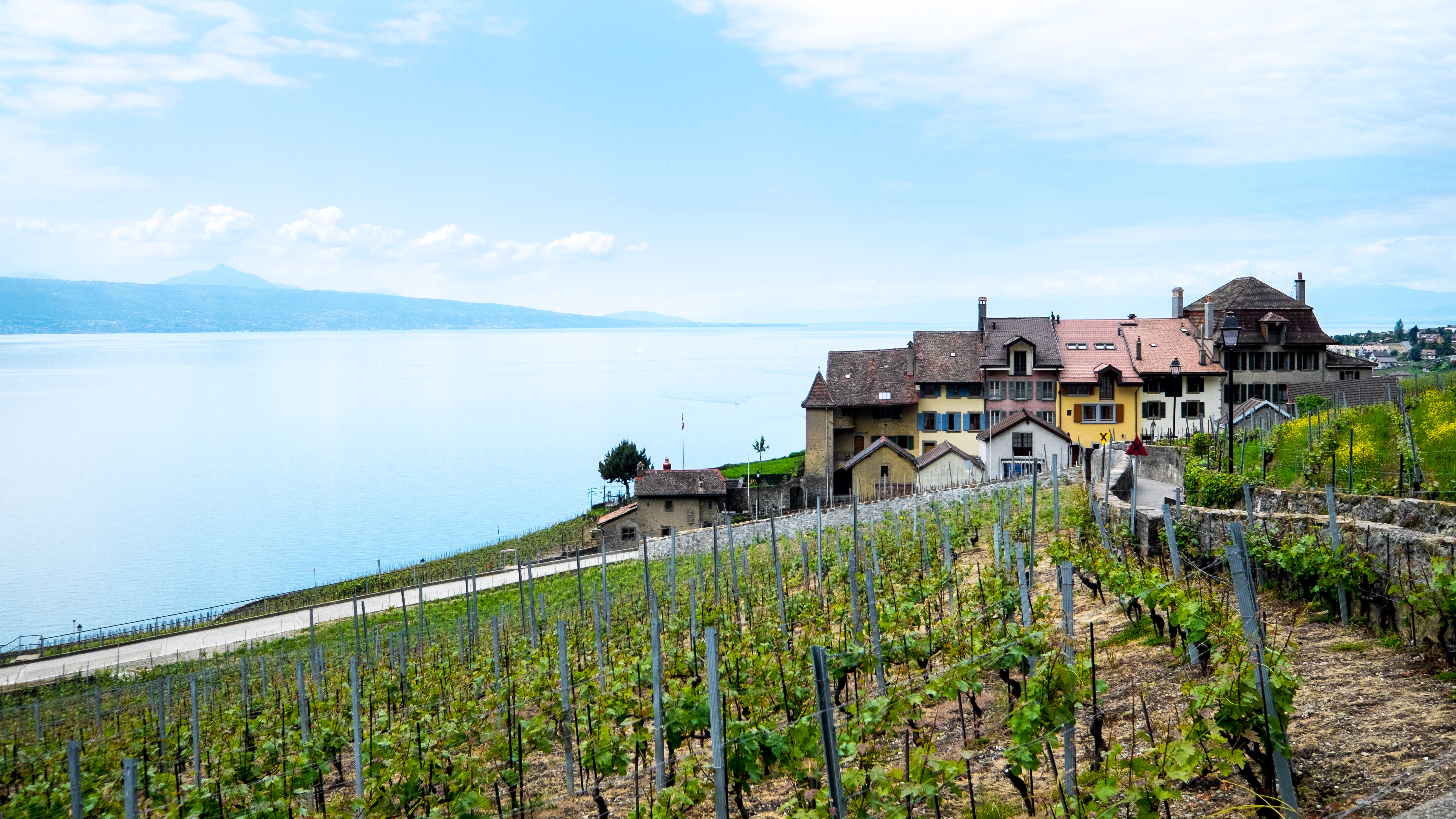 Reihenhäuser in Epesses mit Weinreben im Vordergrund